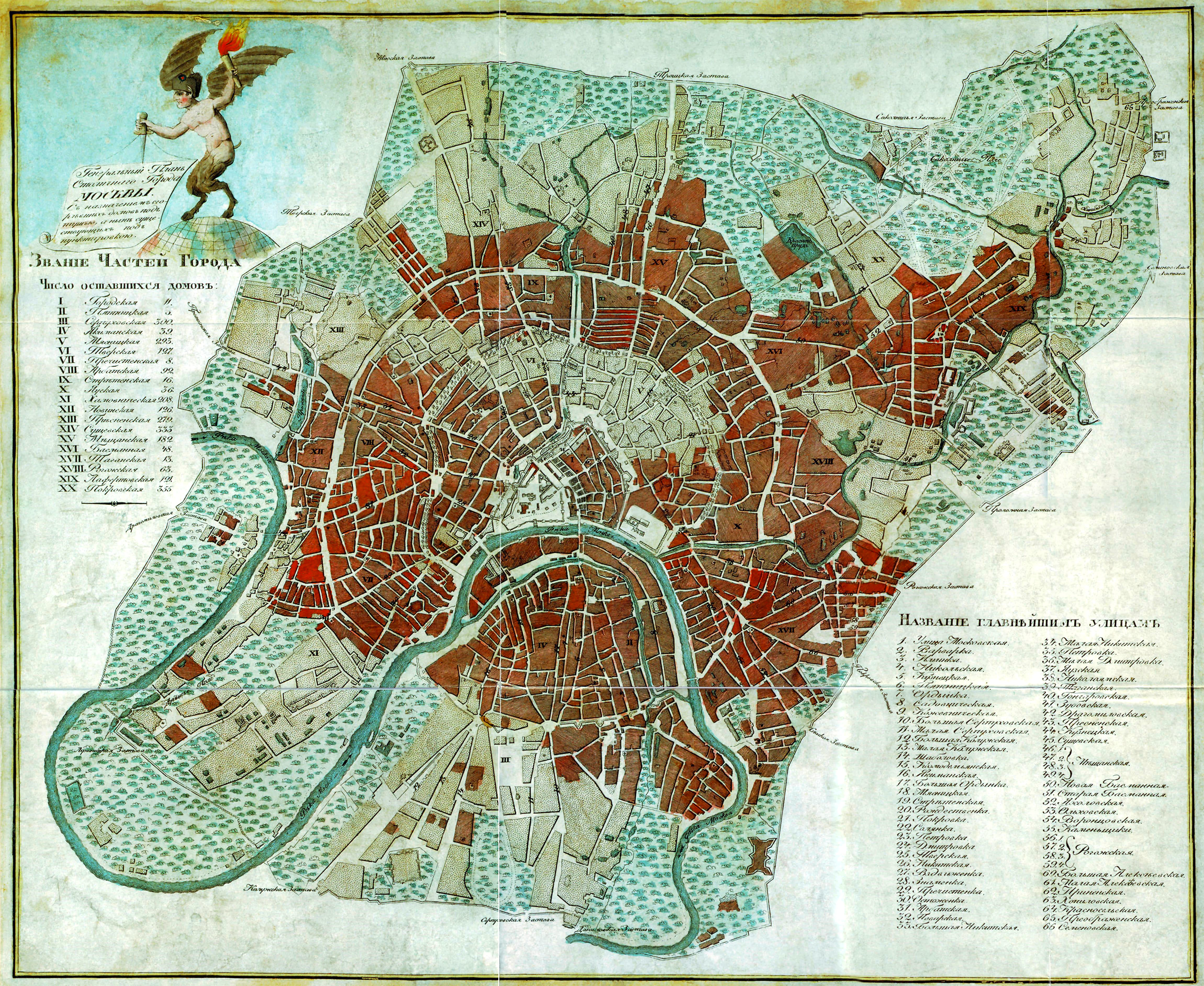 "Генеральный план столичного города Москвы: назначением с сгоревших домов под тушью, а ныне существующих под пунктировкою"